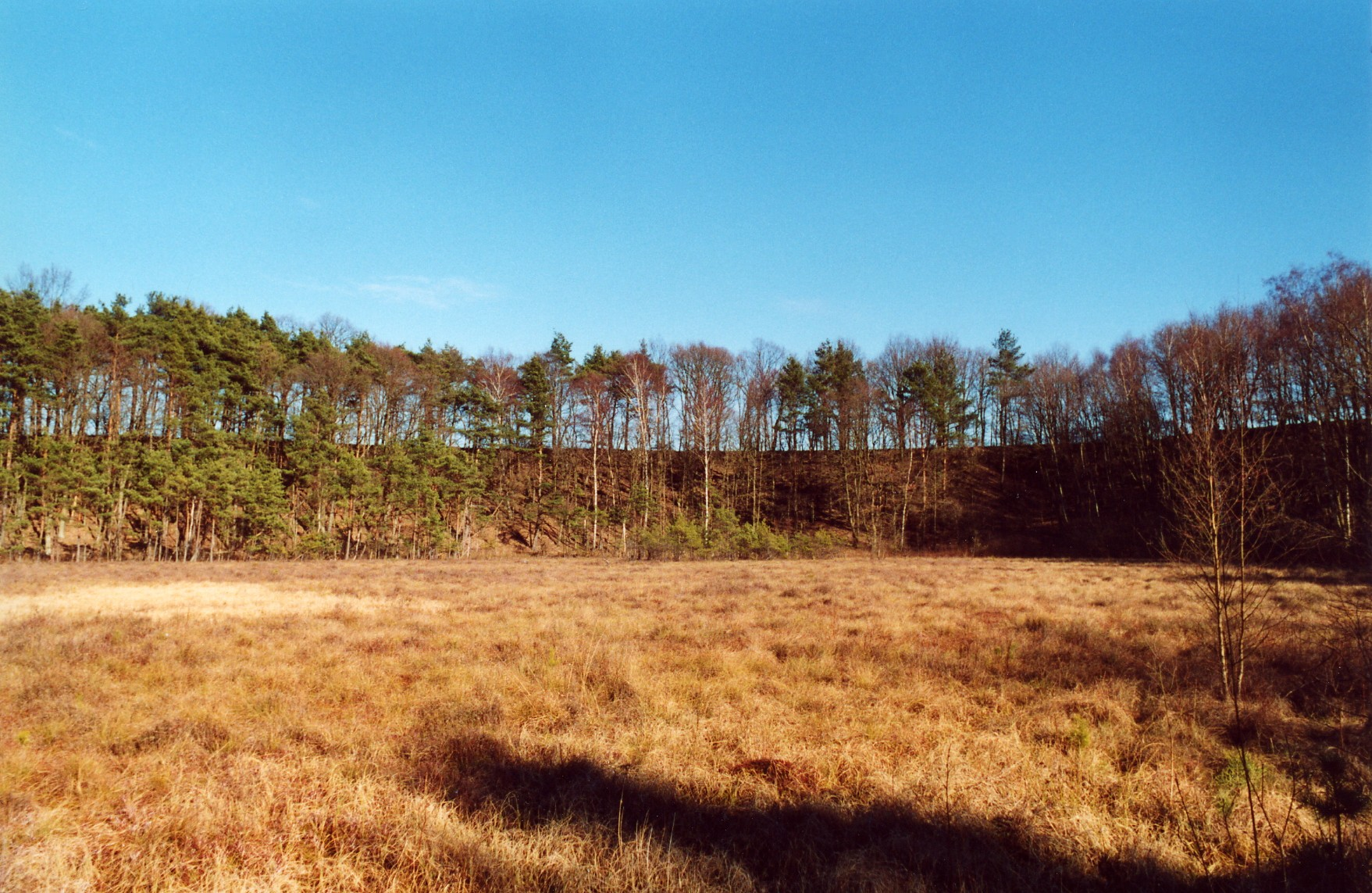 Maujahn-Moor mit bewaldeten Steilwänden des Erdfalltrichters im Vorfrühlingsaspekt.